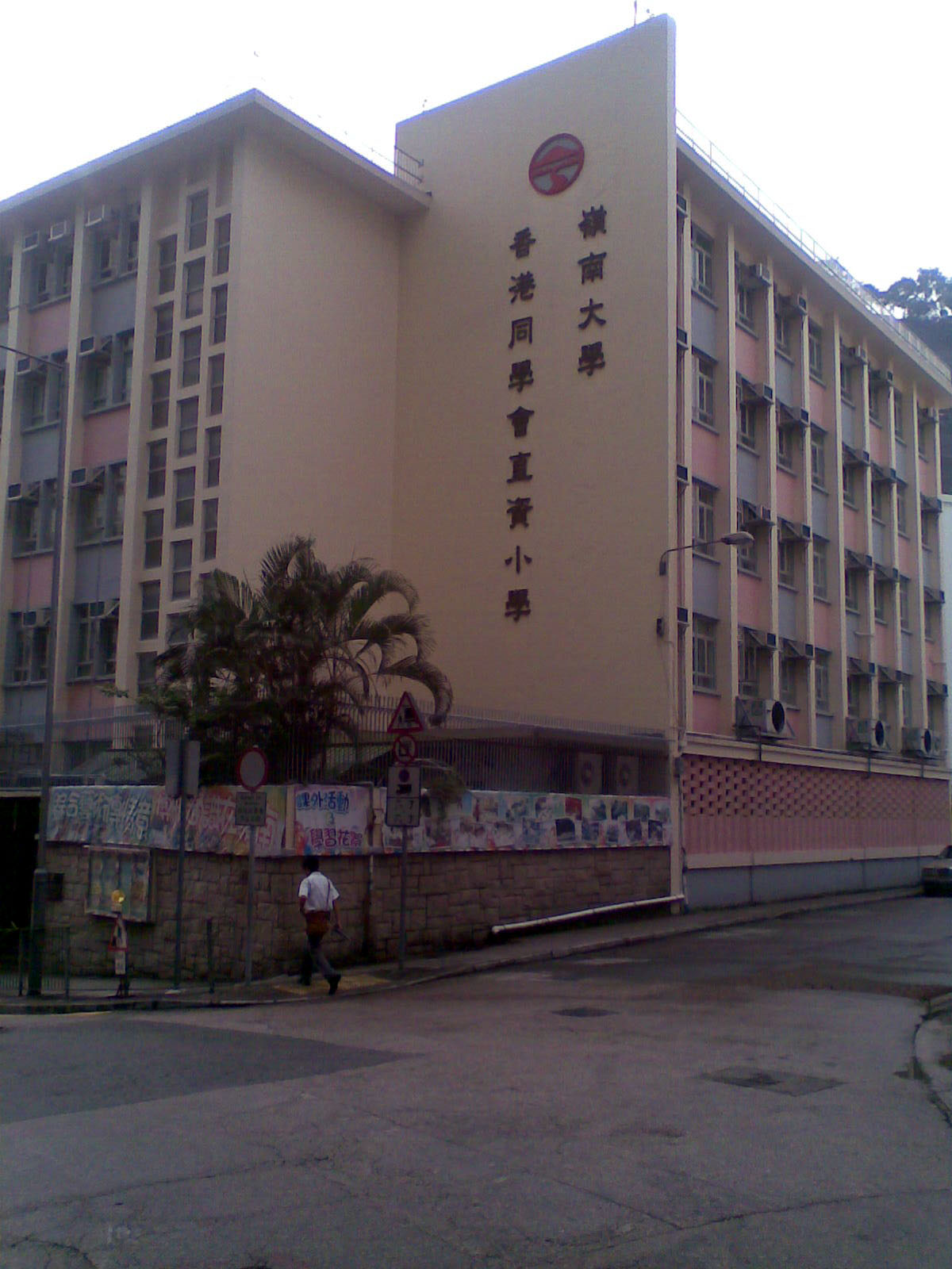 嶺南同學會小學